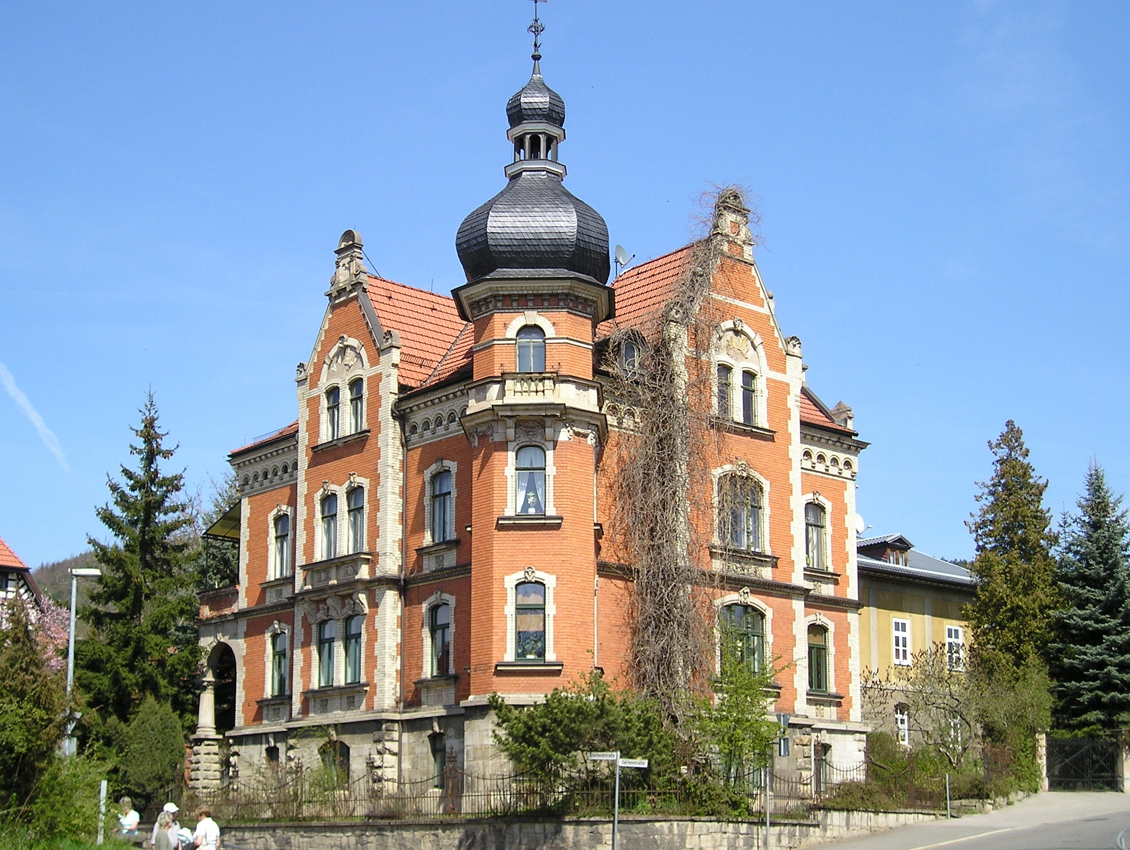 Denkmalgeschützte Stadtvilla in Meiningen